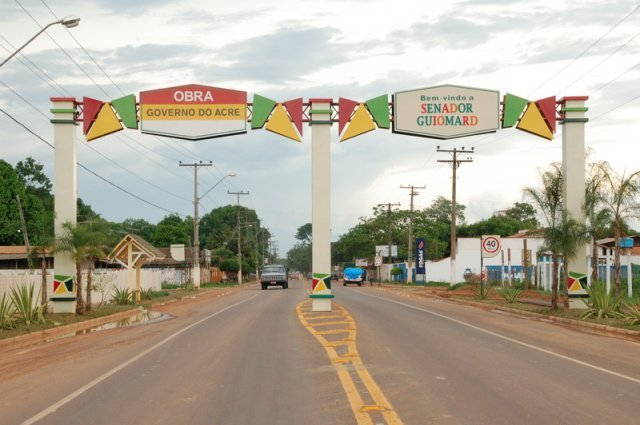 Pórtico de Senador Guiomard